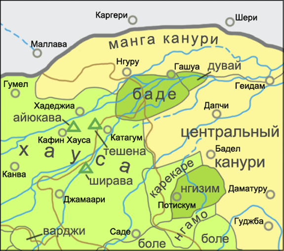 Ареал языков подгруппы баде-нгизим (Нигерия). Источники: Lewis, M. Paul, Gary F. Simons, Charles D. Fennig: Bade. A language of Nigeria. Ethnologue: Languages of the World (19th Edition). Dallas: SIL International (2016); Temple, O. Notes on the tribes, provinces, emirates and states of the northern provinces of Nigeria / edited by C. L. Temple. — Cape Town: Argus, 1919. — С. 32—33, 483—484. — ISBN 5-7695-1445-0; Lewis, M. Paul, Gary F. Simons, Charles D. Fennig: Nigeria, Map 4. Ethnologue: Languages of the World (19th Edition). Dallas: SIL International (2016); Blench, Roger. 3rd. Edition: An Atlas of Nigerian Langages. P. viii. Cambridge: Roger Blench Website. Publications (2012).